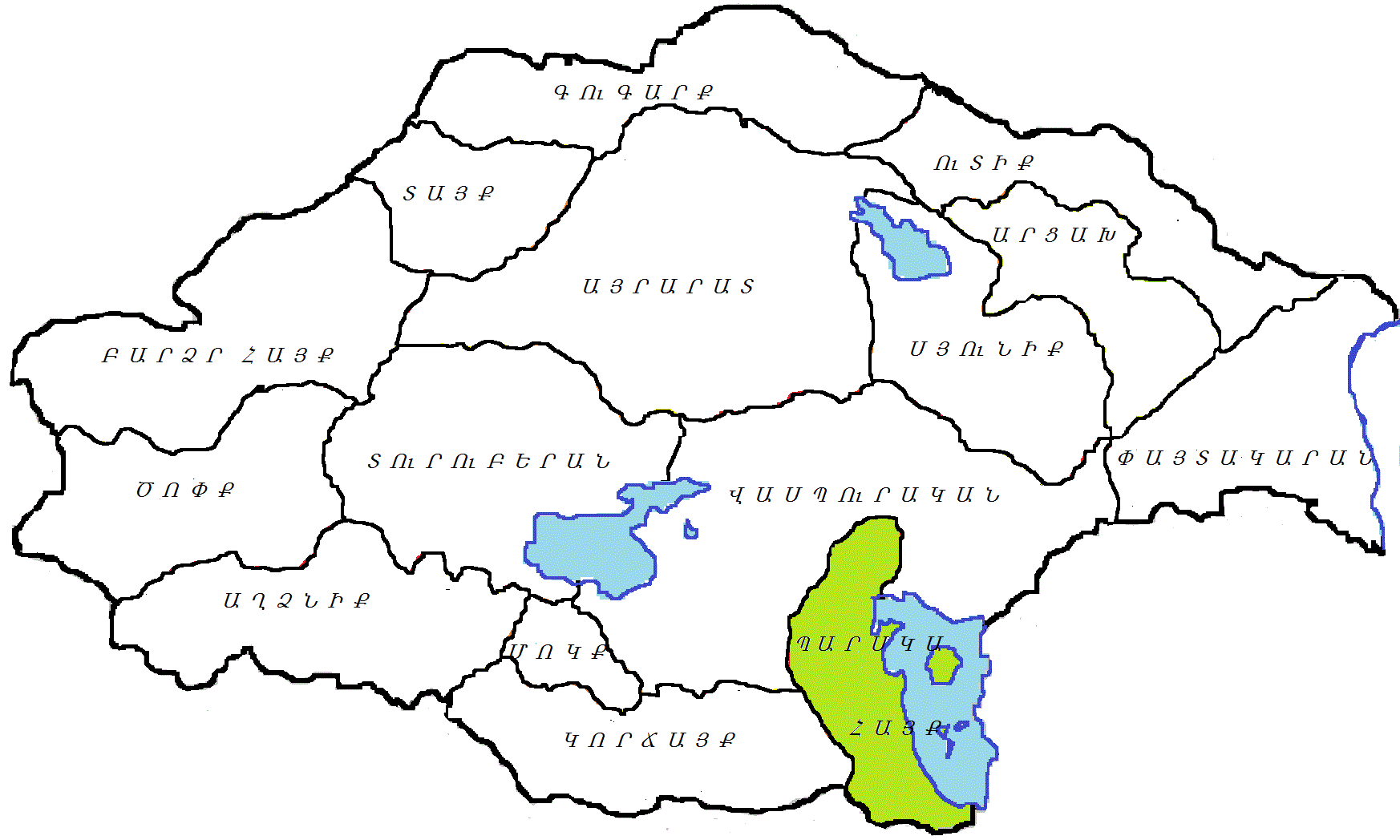 Պարսկահայք, Մեծ Հայք